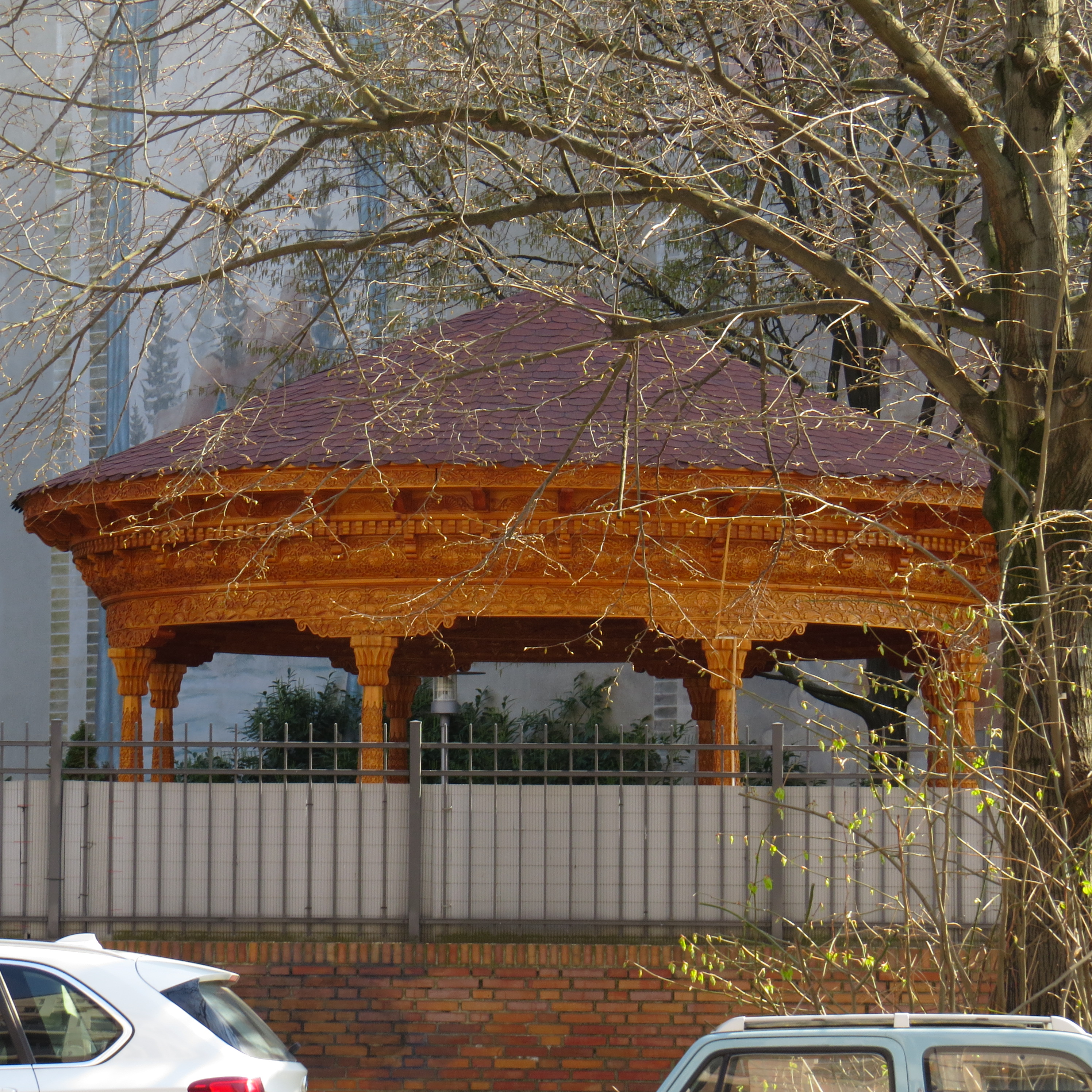 Botschaft der Republik Tadschikistan